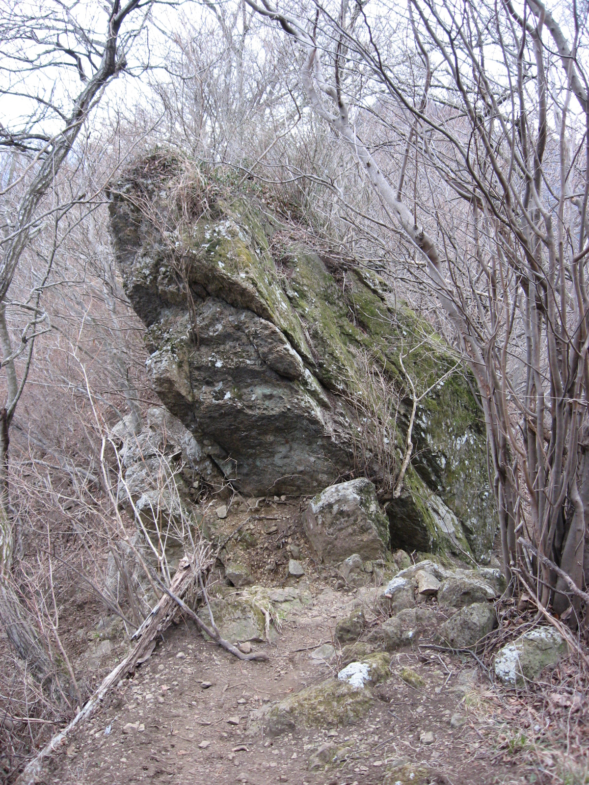 経ヶ岳の経石